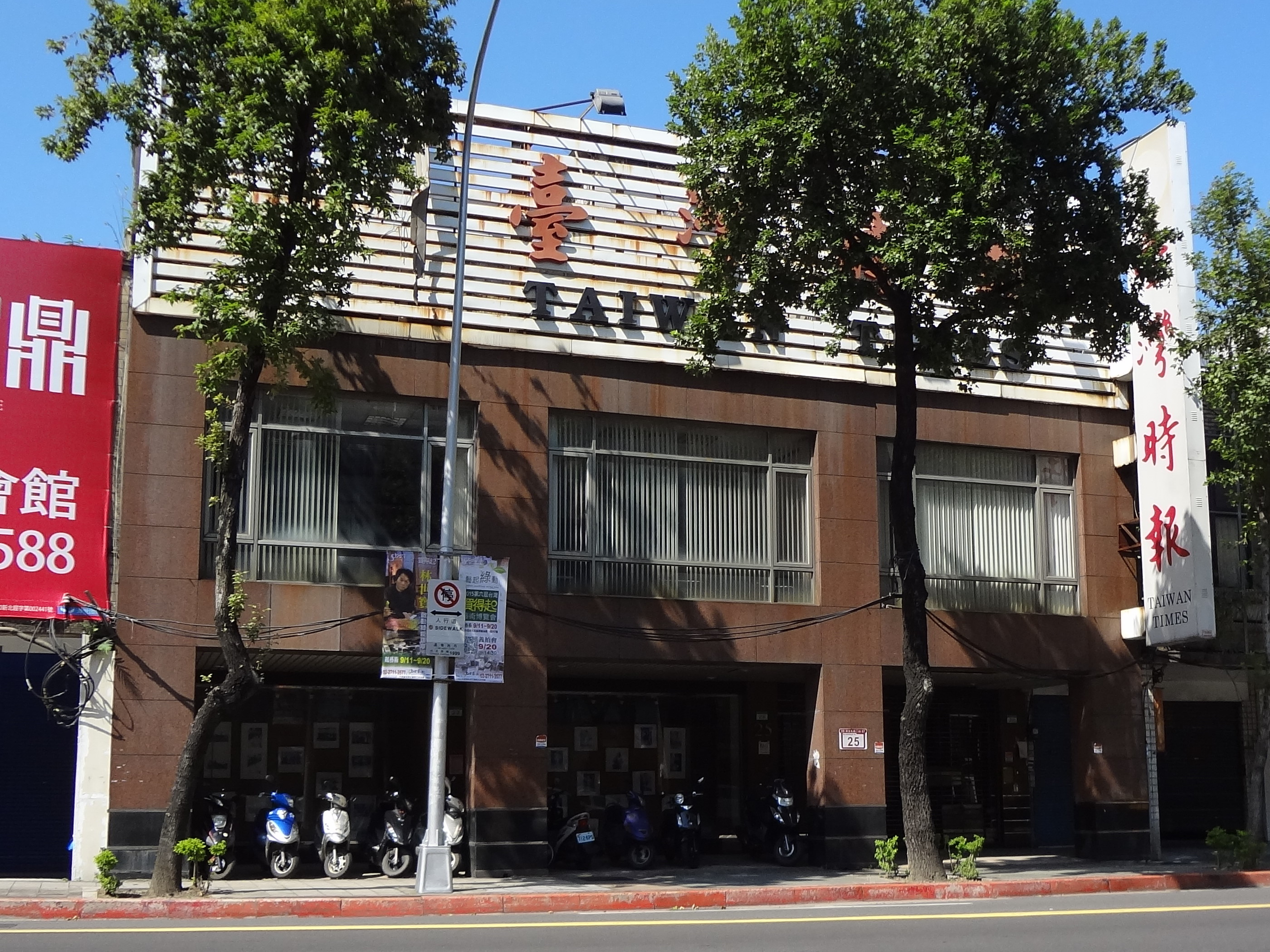 《臺灣時報》臺北辦事處，地址：臺北市大同區民生東路二段25號。